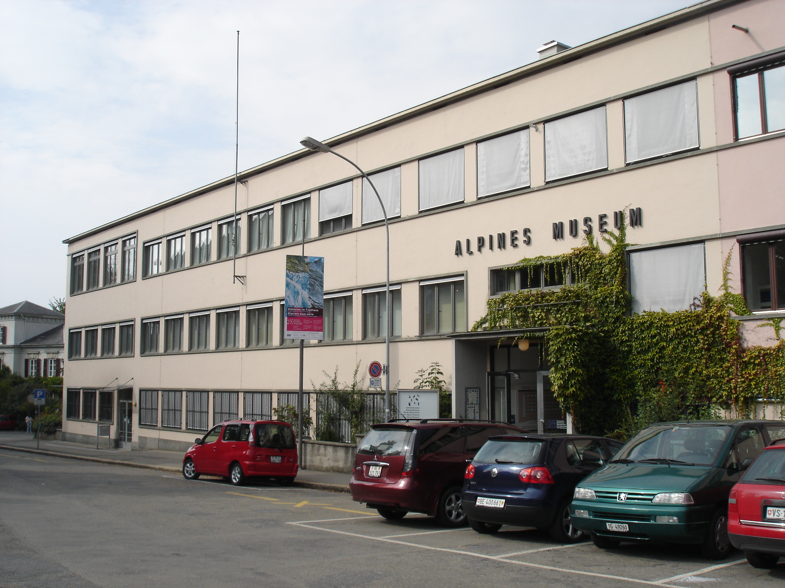 Alpines Museum in Bern, Switzerland